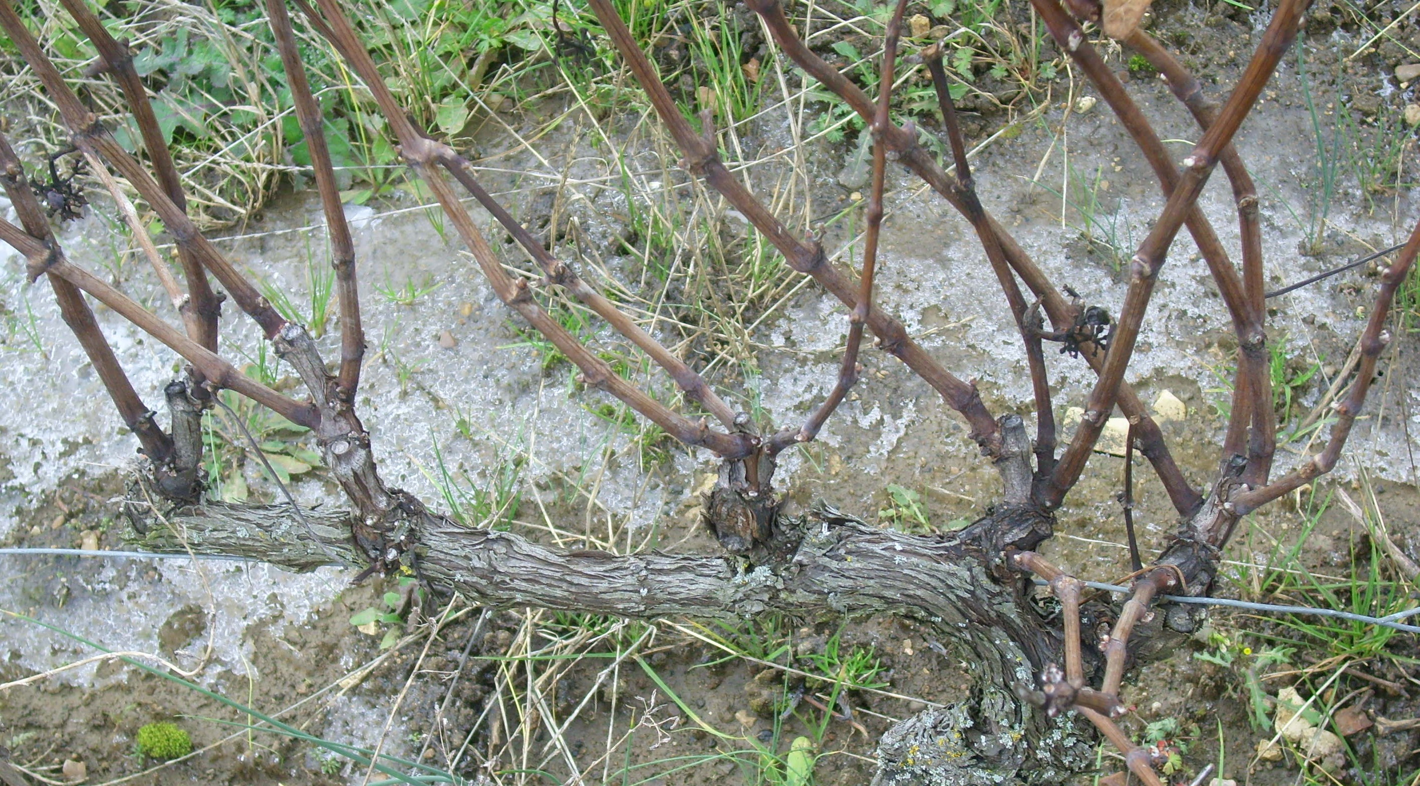 Pied de vigne dont le type de taille est le cordon de royat